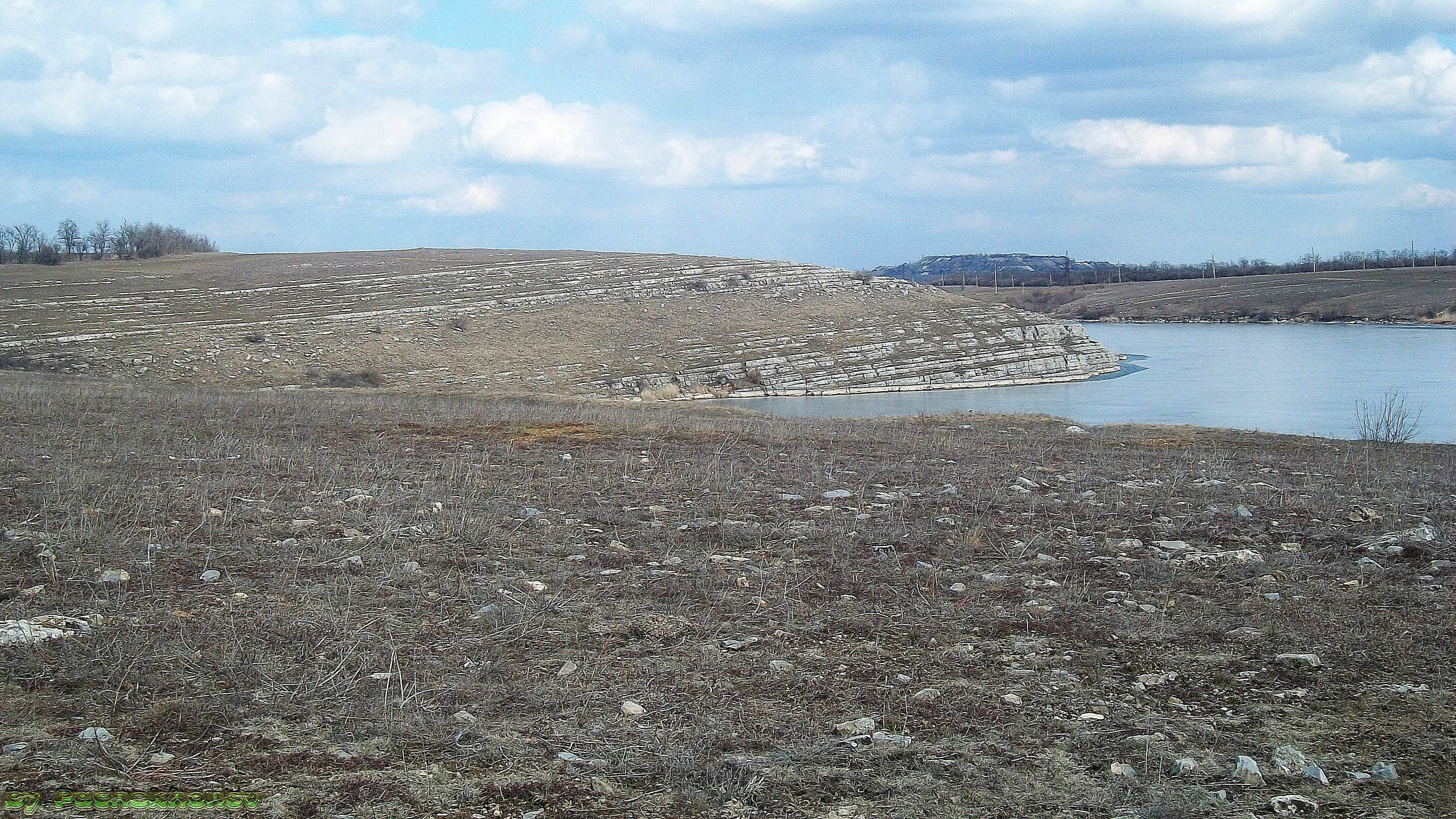 «Стыльское обнажение» - уникальный памятник природы общегосударственного значения, который входит в Top-100 конкурса «Семь природных чудес Украины».